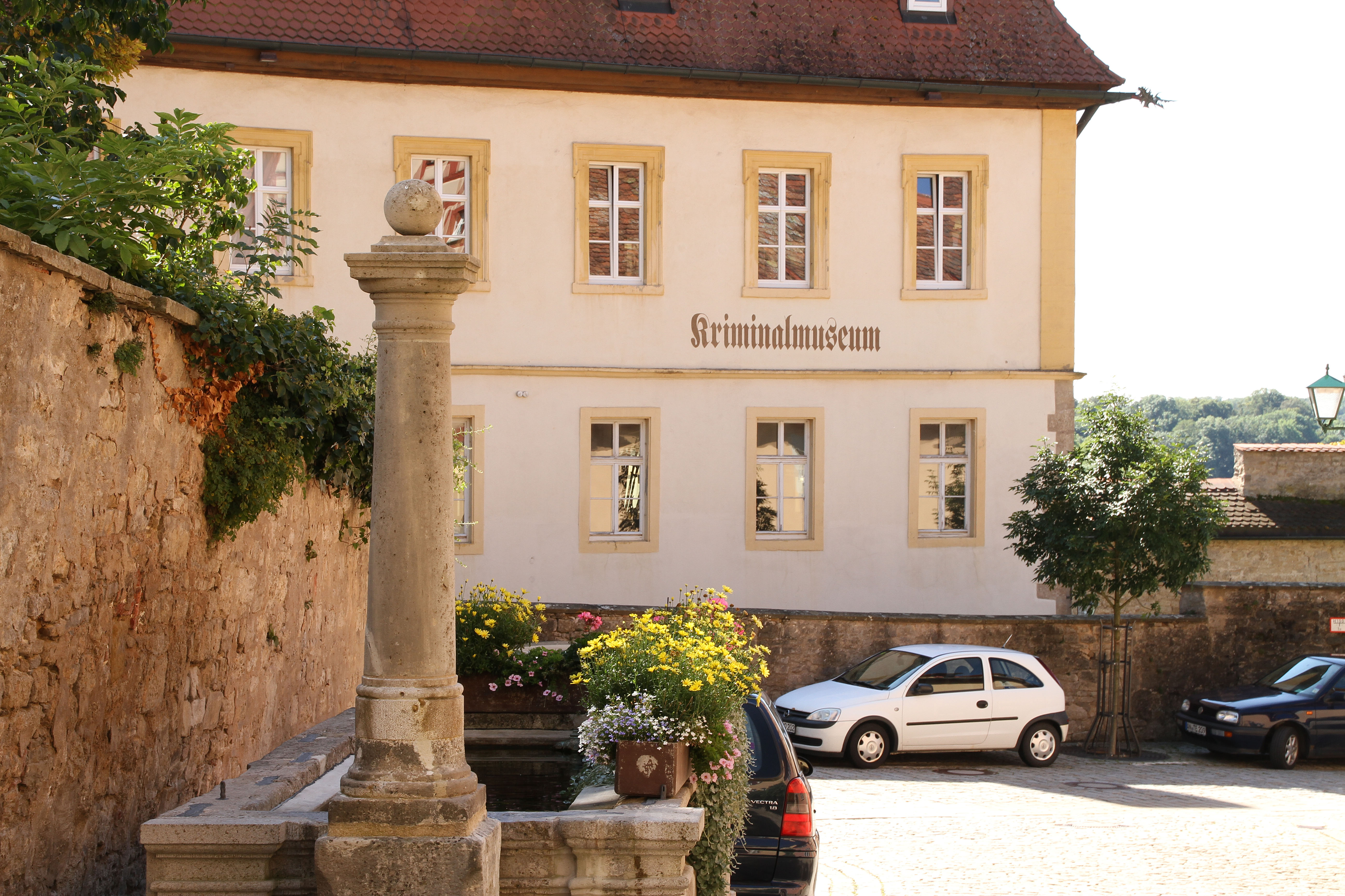 Kriminalmuseum Außenansicht